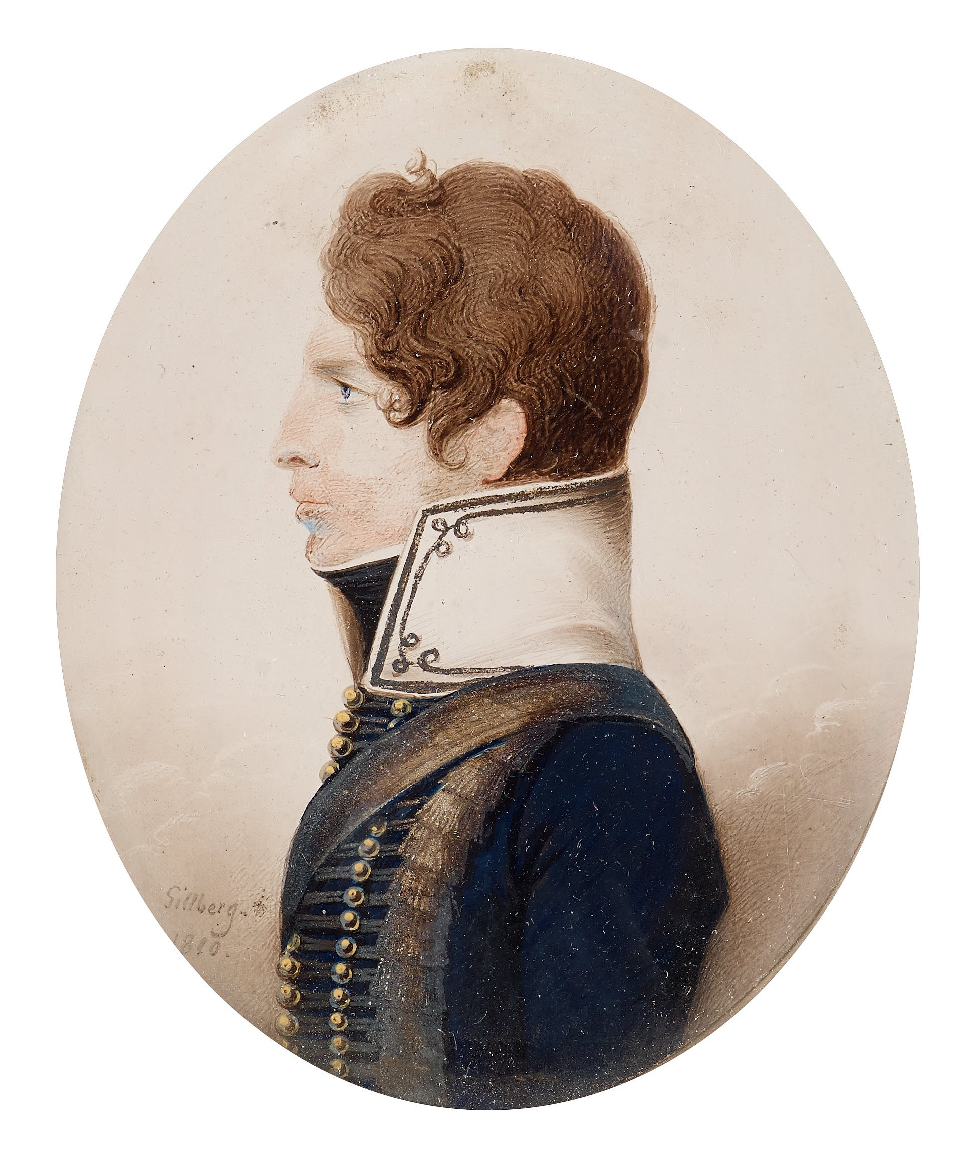 Porträtt av Ture Gustaf von Essen (1790-1860) iklädd uniform för en kornett vid Livregementbrigadens husarkår. Målning från 1810 av Jacob Axel Gillberg.